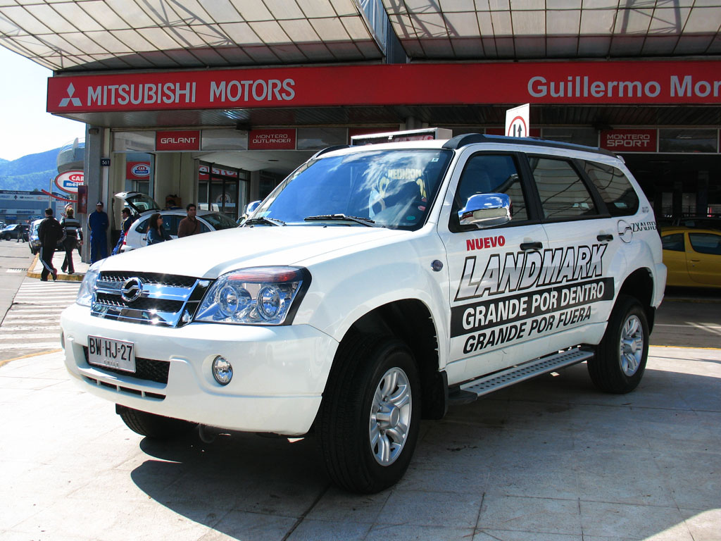 ZX Auto Landmark 4WD 2009